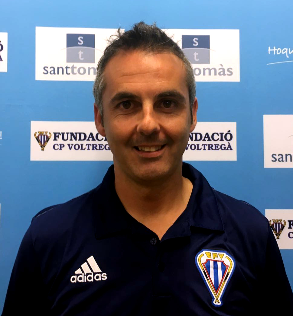 Alberto Borregán, exjugador i entrenador d'hoquei sobre patins